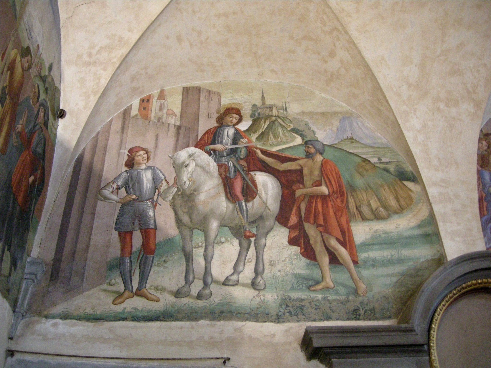 Oratorio dei buonomini di s. martino, lunette di Francesco d'Antonio, san martino dona il mantello